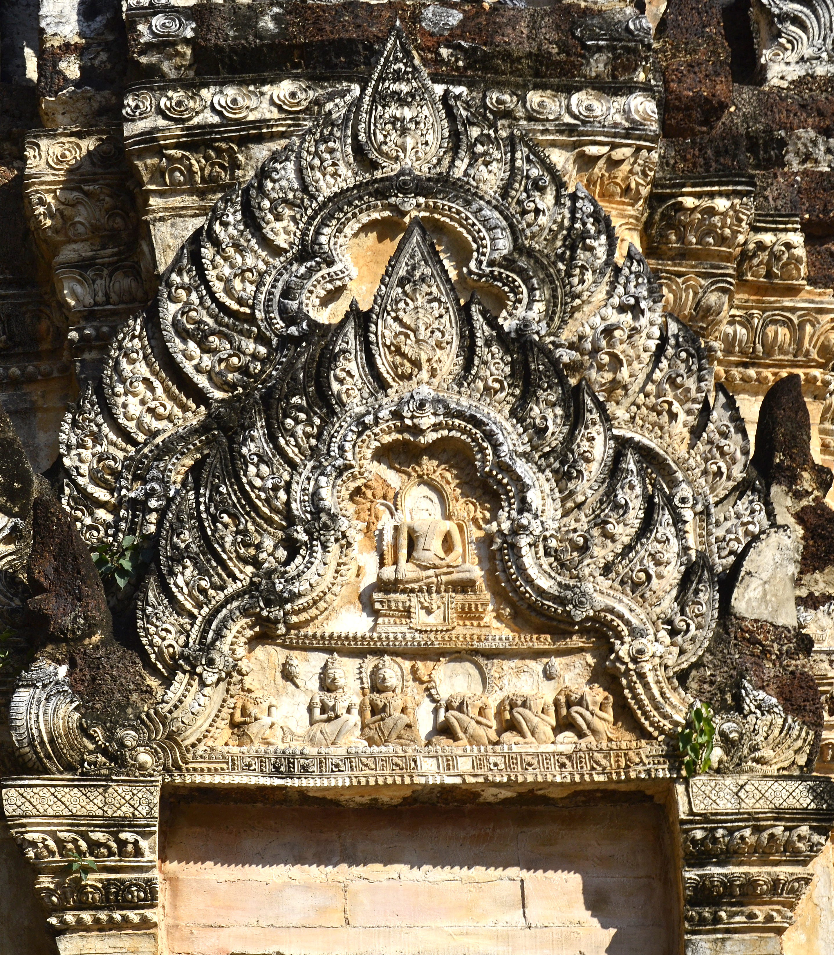 Wat Phra Phai Luang im Geschichtspark Sukhothai